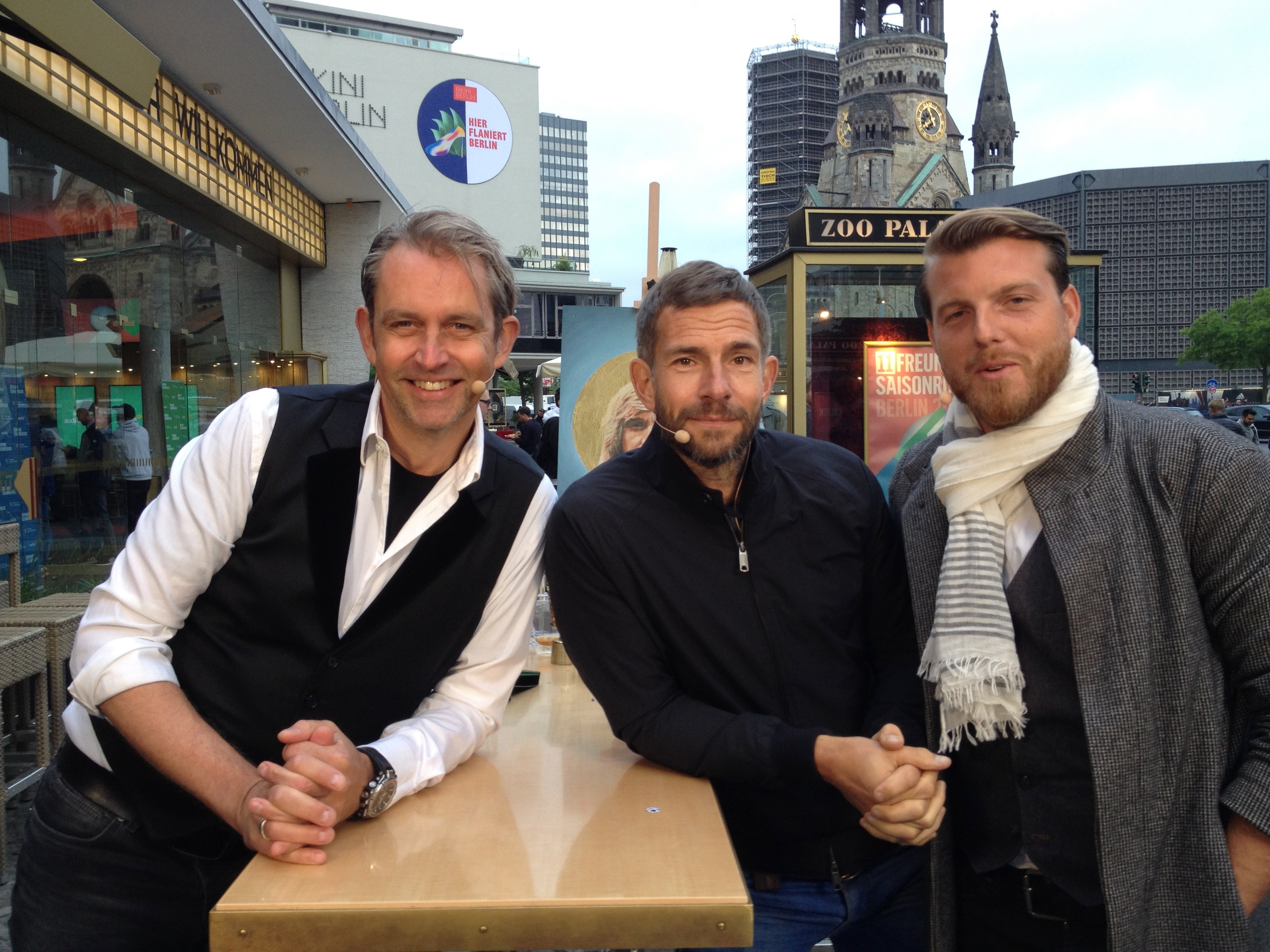 Maik Nöcker, Micky Beisenherz und Lucas Vogelsang nach einem Live-Podcast in Berlin